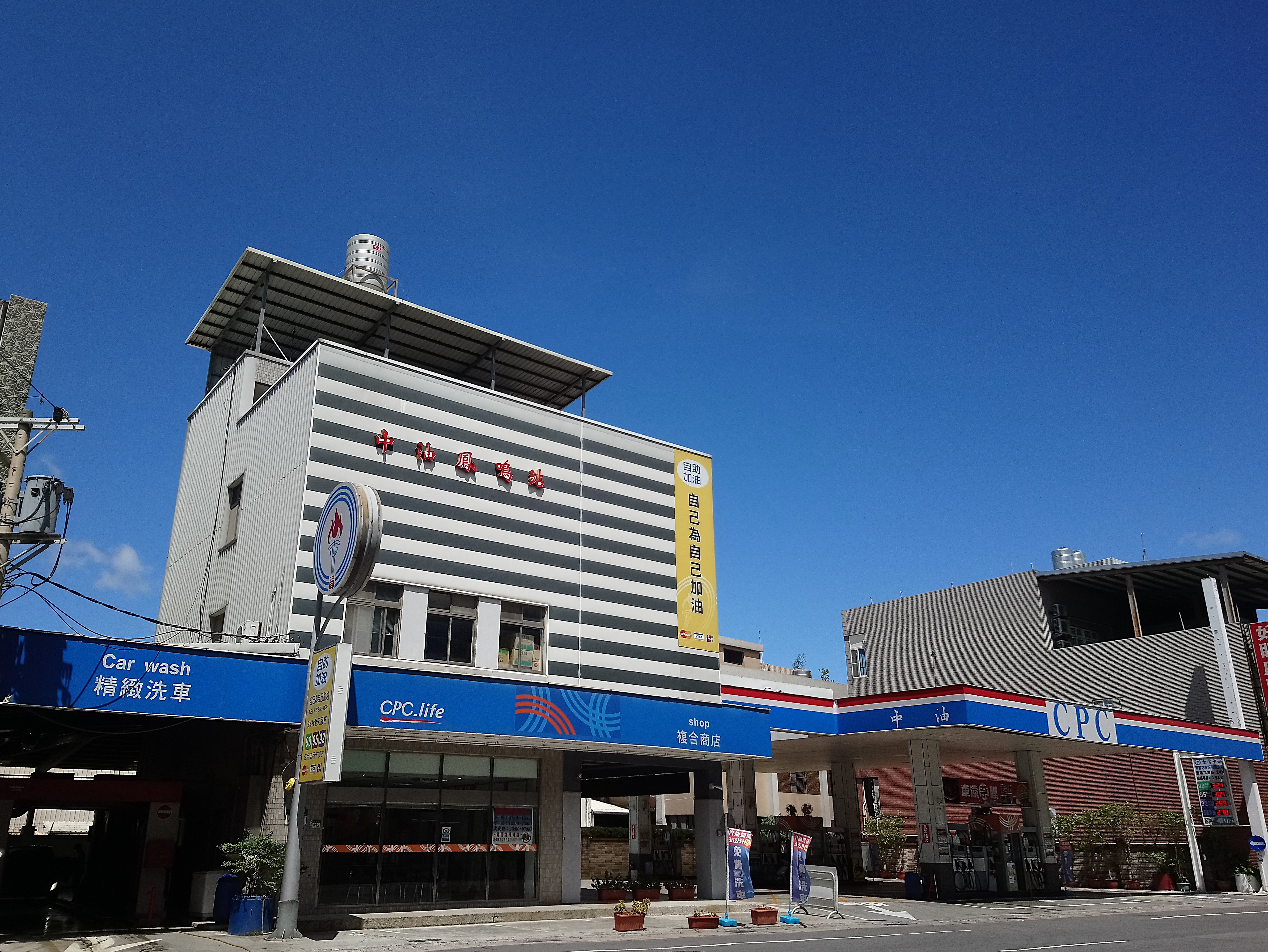 車容坊加油站鳳鳴站,新北市鶯歌區鳳鳴里